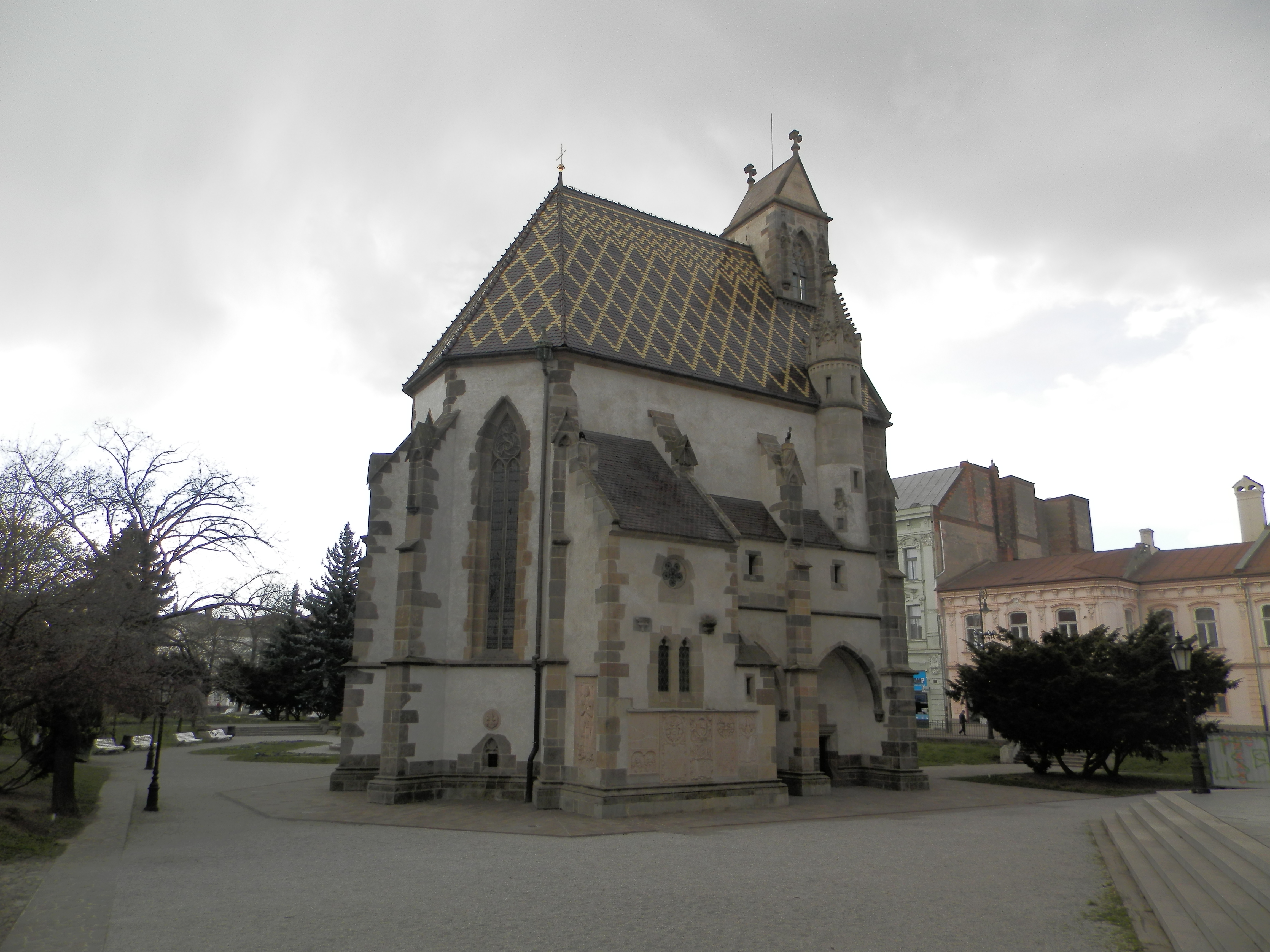 Kostol sv. Michala v Košiciach. Severovýchodná strana